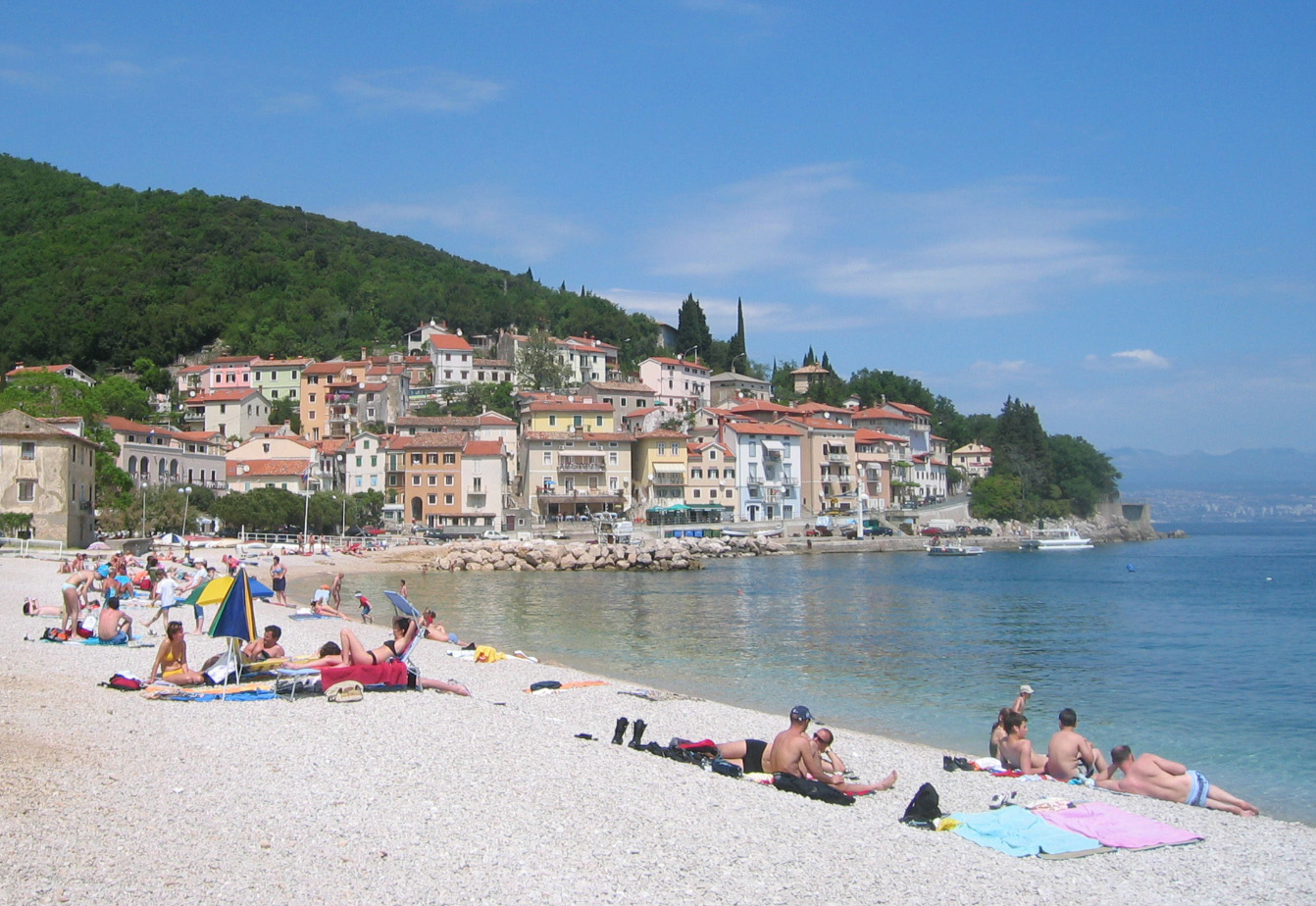 Mošćenička Draga, village in Istria (Croatian coast)